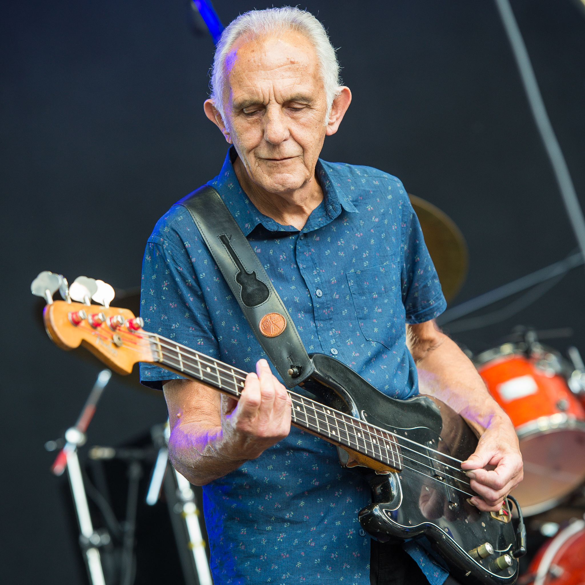 Colin Hodgkinson,Concertbüro Franken,Festival,Konzert,Lieder am See,Livekonzert,Livemusik,Musik,Ten Years After